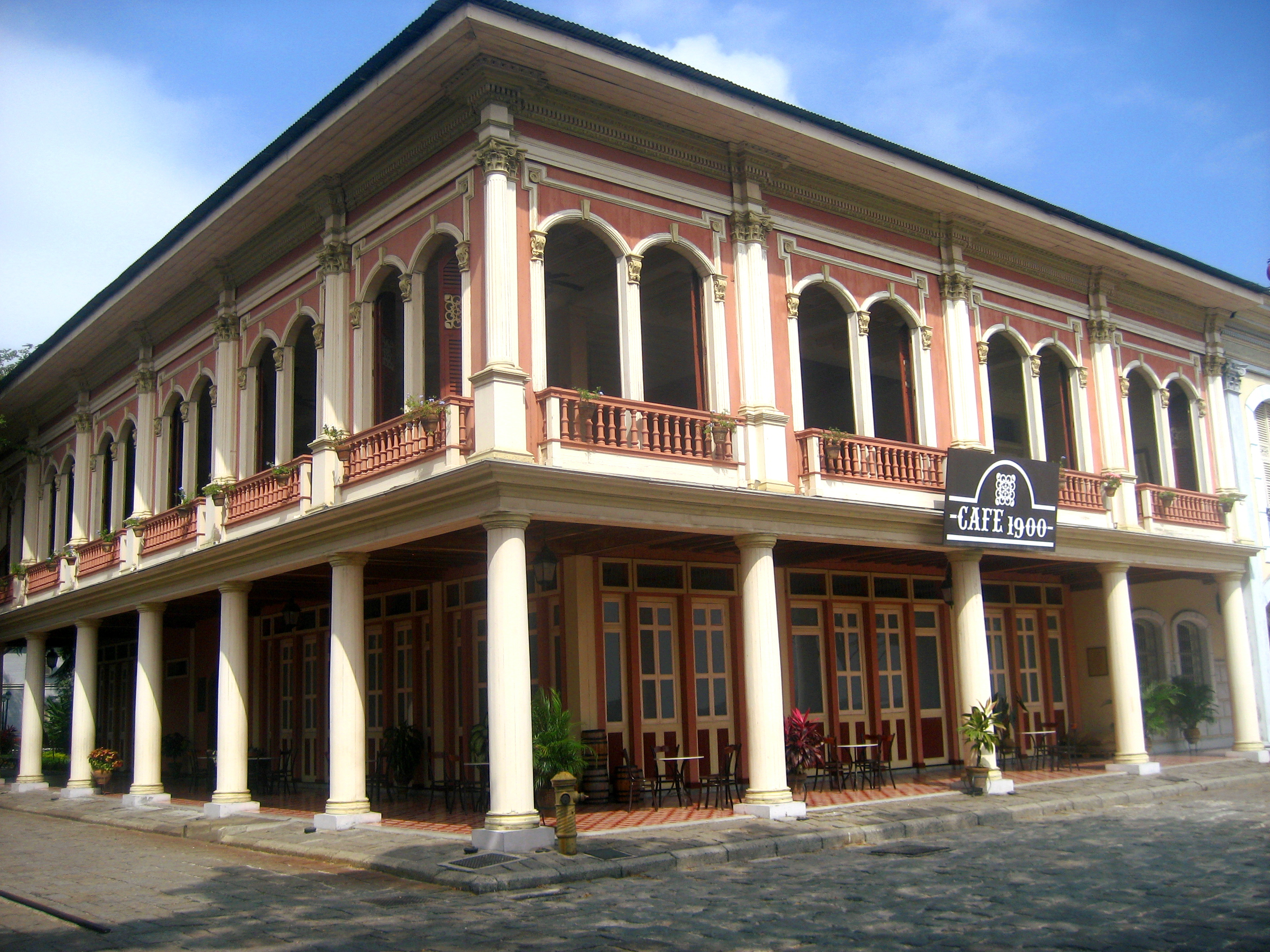 Foto del Café 1900 en el Parque Histórico Guayaquil